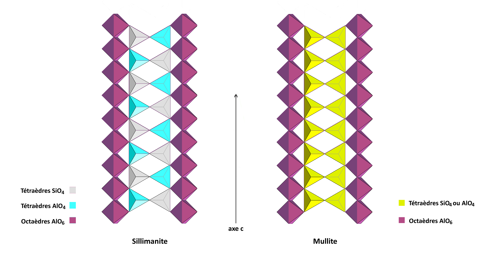 Coupes des structures de la sillimanite et de la mullite, parallèles à l'axe c. La structure cristalline de la mullite 2SiO2.3Al2O3 est une évolution de celle de la sillimanite de formule SiO2.Al2O3. La stoechiométrie de la mullite est obtenue par substitution d'atomes Al (trivalents) à des atomes Si (tétravalents) dans un certain nombre de sites tétraédriques, le déséquilibre de valence étant compensé par le départ d'atomes O laissant des lacunes d’oxygène dans le cristal.